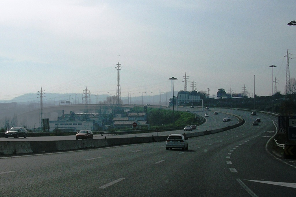 "Via de Cintura Interna" (VCI) inner ring road in Freixo, Porto city, Portugal, near "Ponte do Freixo". Author: Manuel de Sousa.